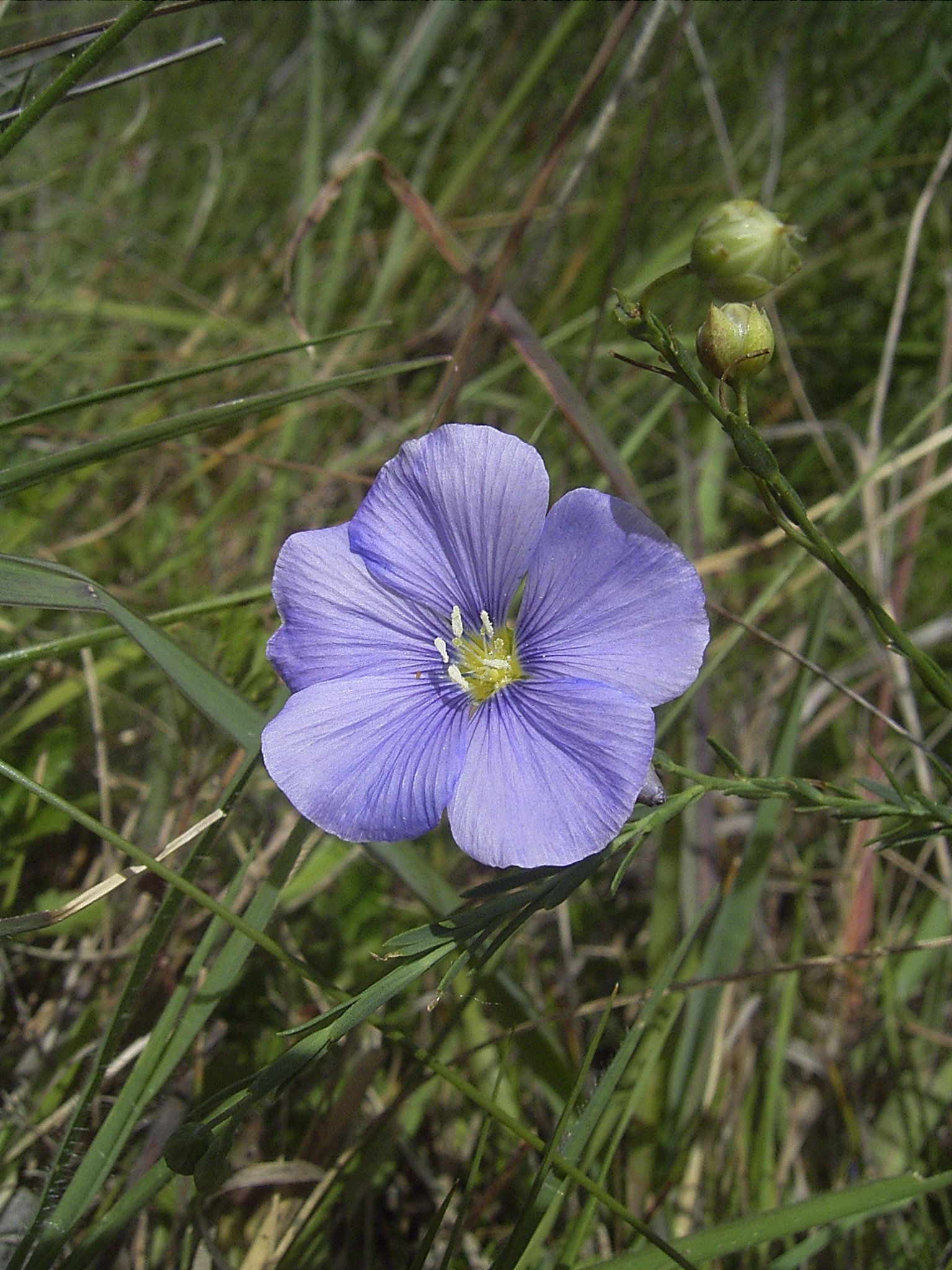 Linum austriacum at Neusiedler See, Austria